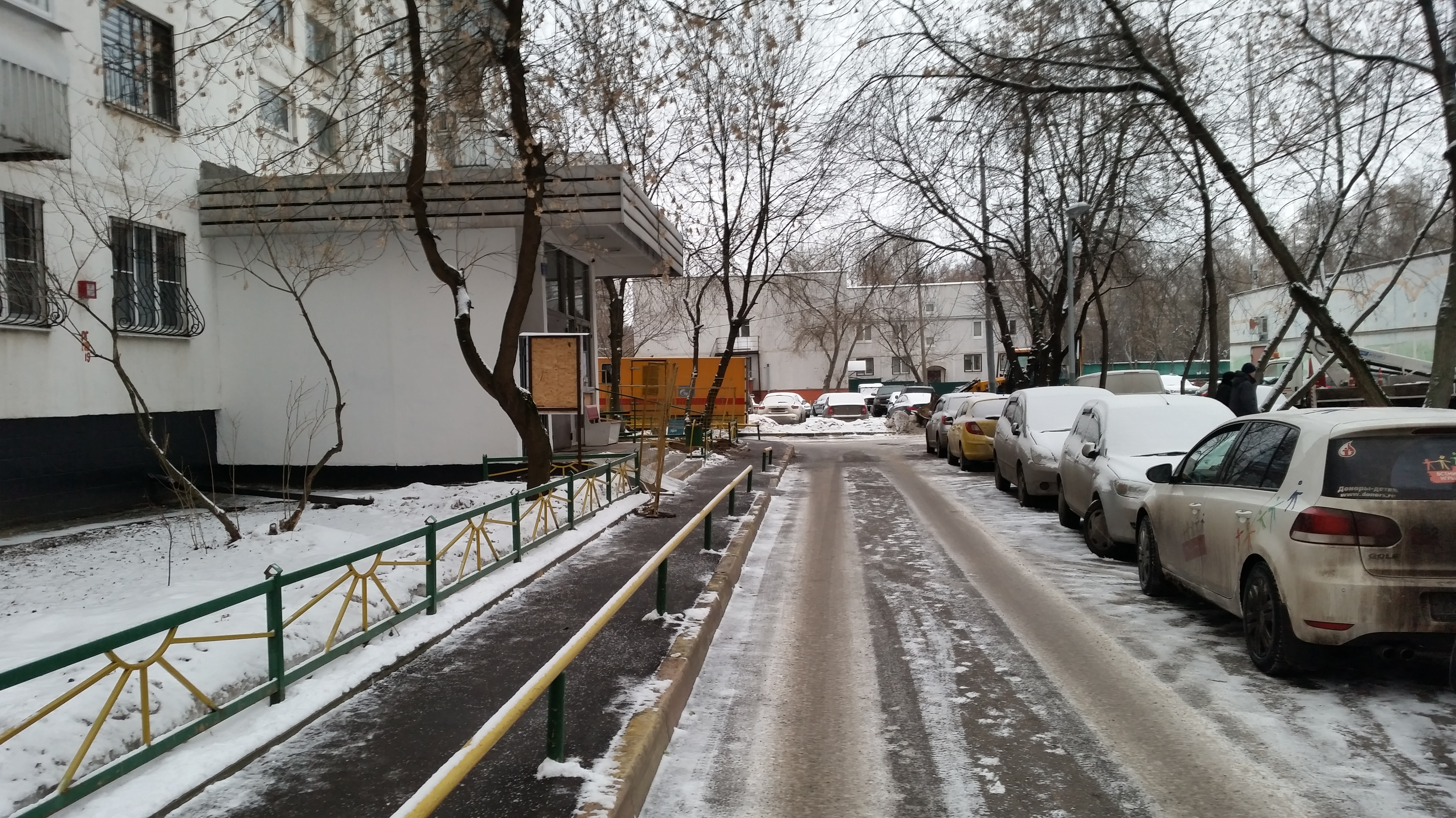 ул., Енисейская дом 21. Место съёмок фильма "Вам и не снилось..." 1980 года.